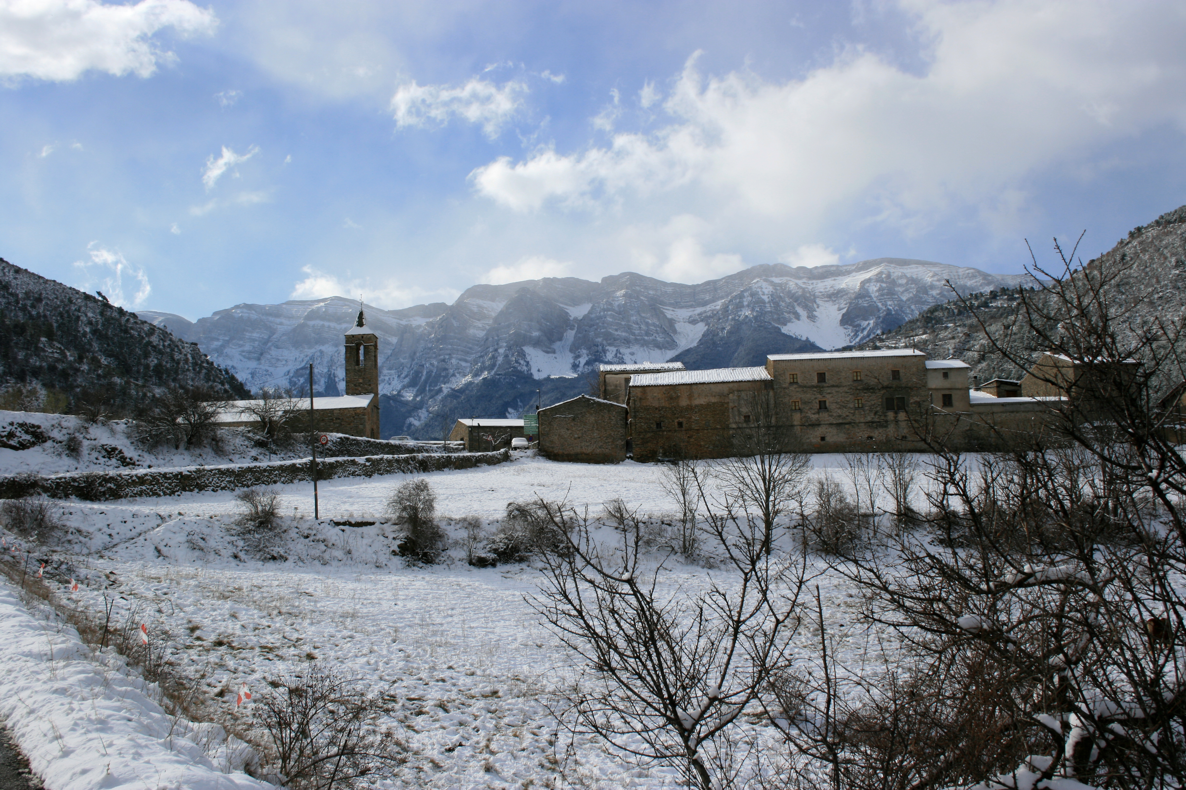 Arseguel